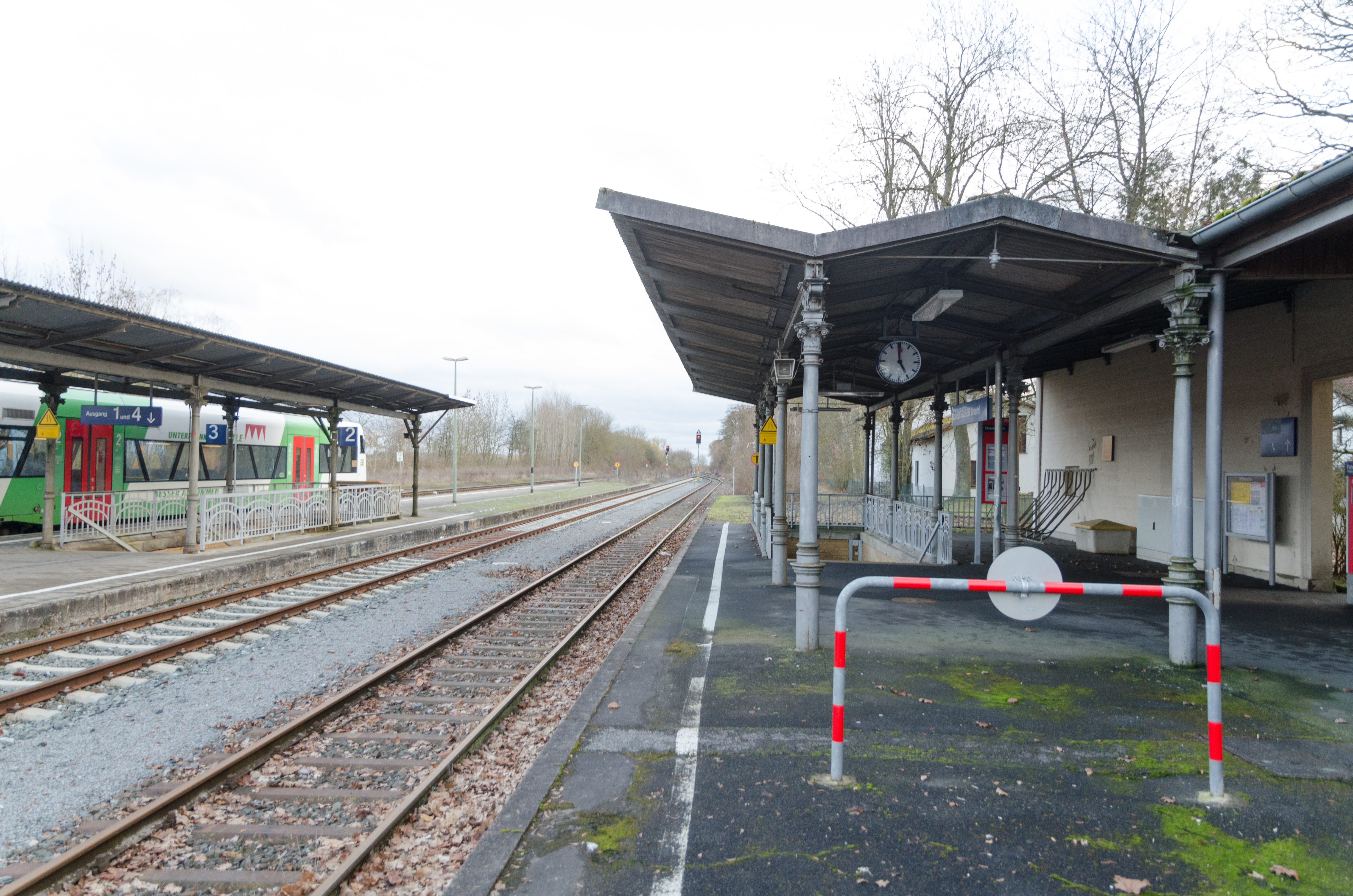 Oerlenbach, Ebenhausen, Bahnhof